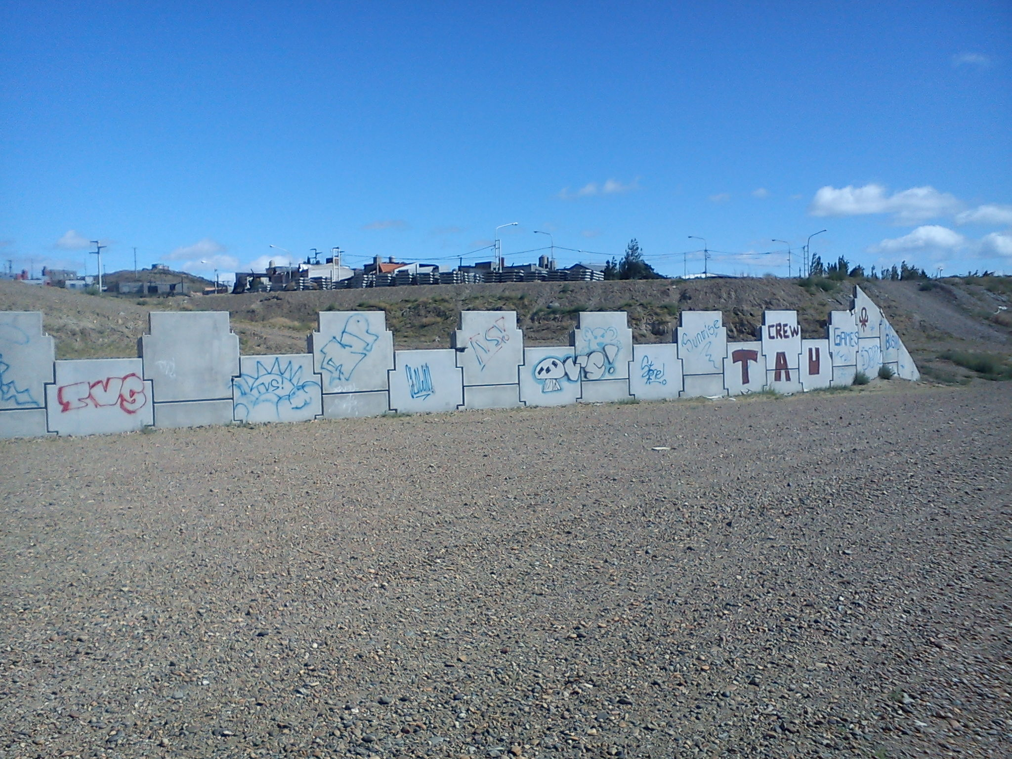 construcción lenta de las paredes del puente